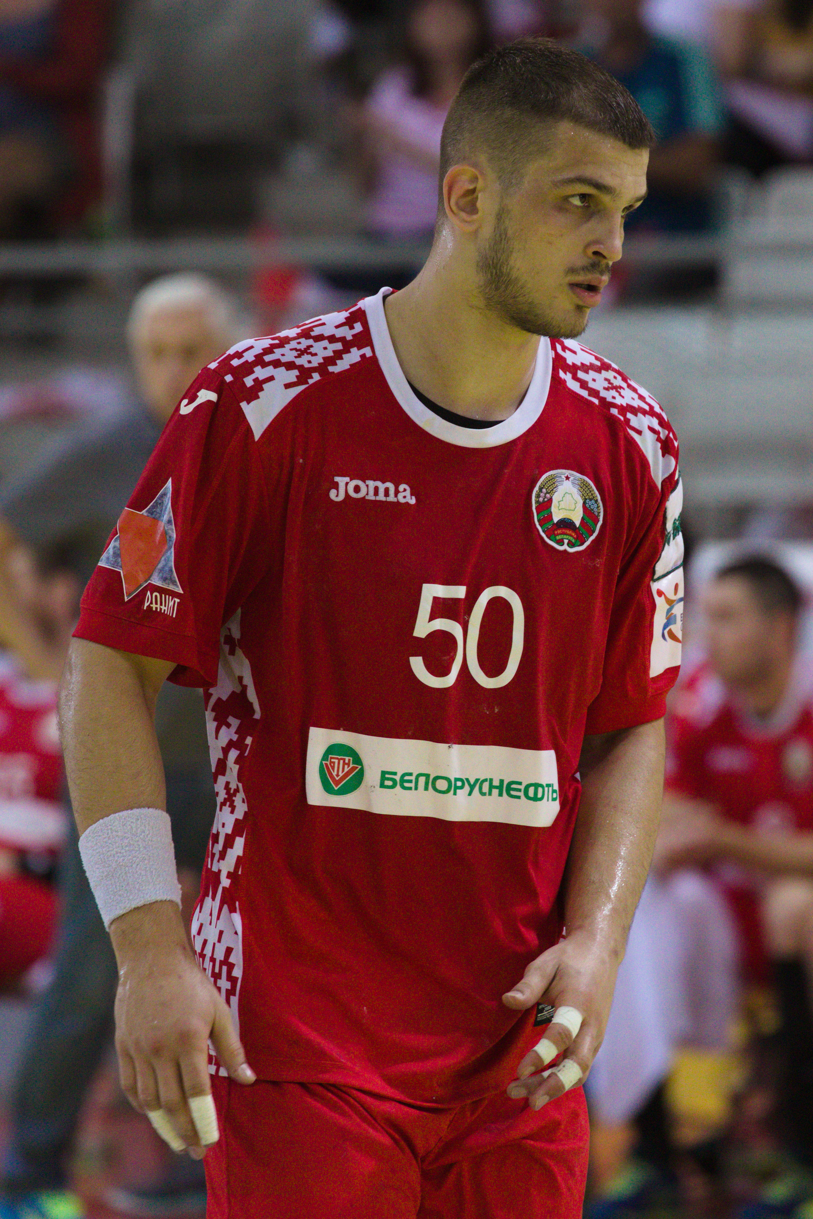 Handball-WM-Qualifikationsspiel zwischen Österreich und Weißrussland in Wien, 13. Juni 2018: Arzjom Karaljok